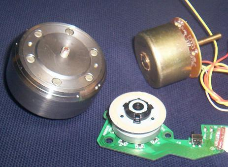 Kleine Außenläufermotoren, rechts und unten: elektronisch kommutierte Gleichstrommotoren; links: Kreiselmotor für 400 Hz Drehstrom